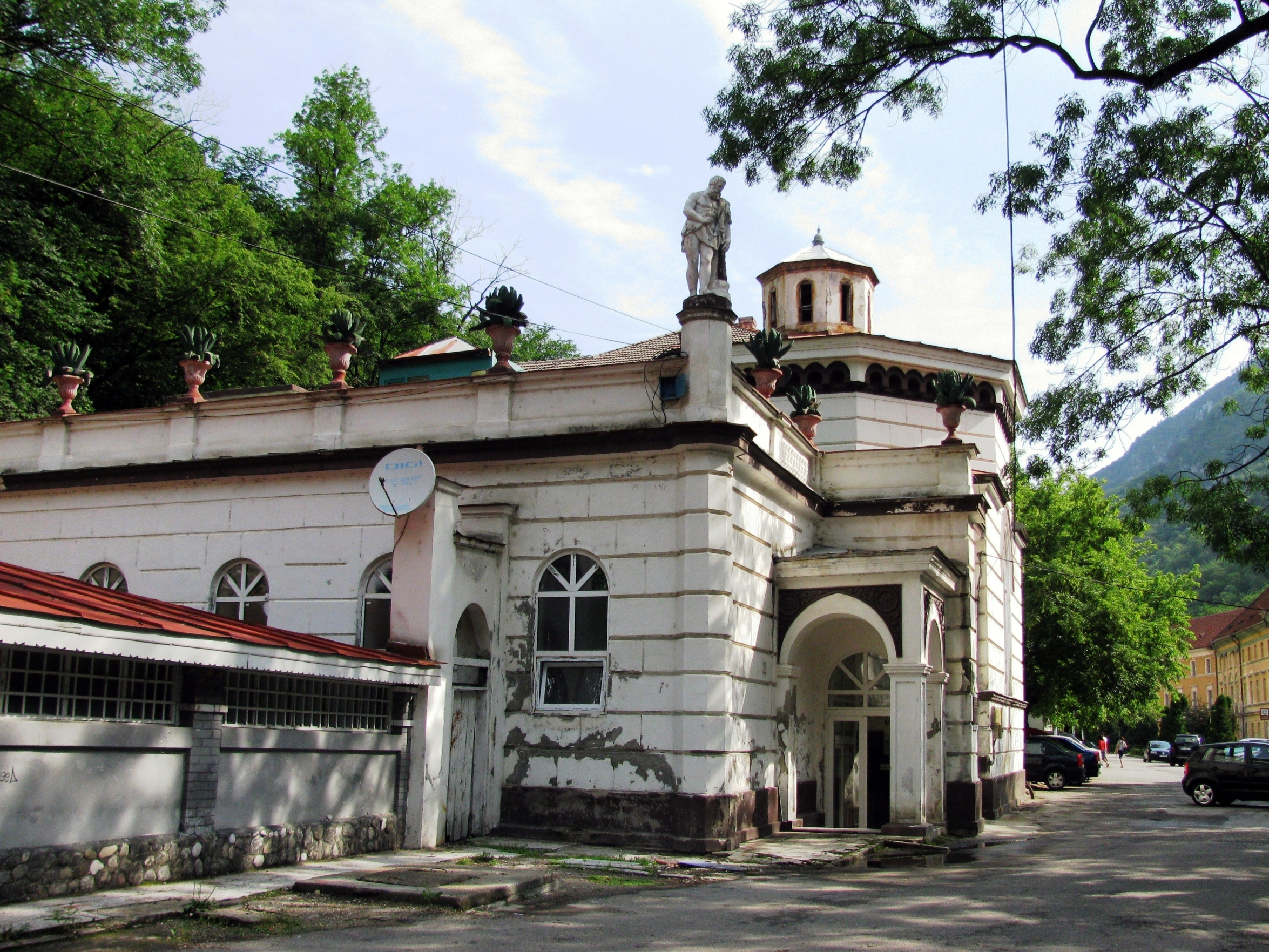 (Baia "pentru dureri de oase", Baia Elisabeta, Baia Closca) A fost construita in 1810, din caramida, iar in 1858 a fost refacuta in forma actuala. Pe acoperis se afla o statuie a lui Hercules. Baia a fost modernizata in 2002 si functioneaza ca baza de tratament a Hotelului Ferdinand, de care este legata printr-un culoar acoperit.